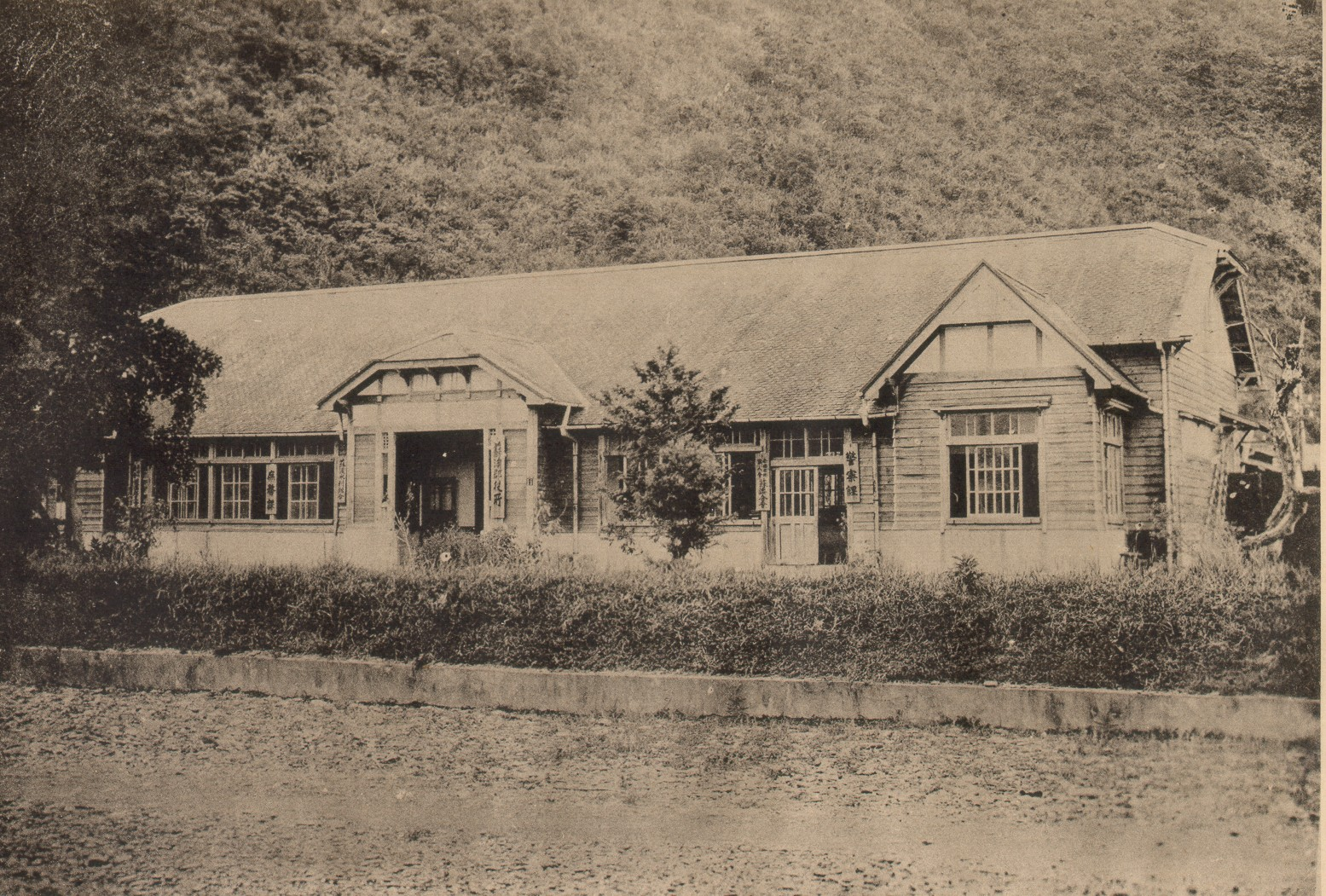 蘇澳郡役所